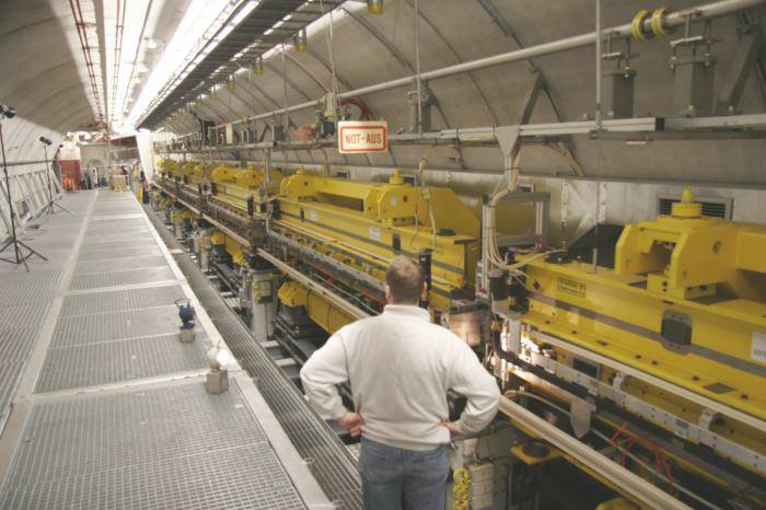 Freie Elektronen Laser FLASH am DESY in Hamburg, Undulatoren (gelb) erzeugen die laserartige Strahlung. Veröffentlichung mit freundlicher Genehmigung DESY, Hamburg.